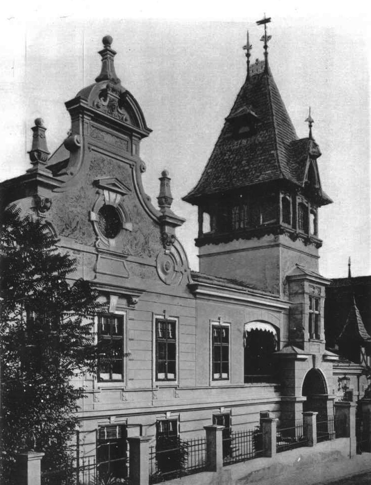 Villa des Papierindustriellen Ferdinand Hauschka aus dem Jahr 1885 in Pötzleinsdorf. Aufnahme vermutlich aus dem Jahr 1891